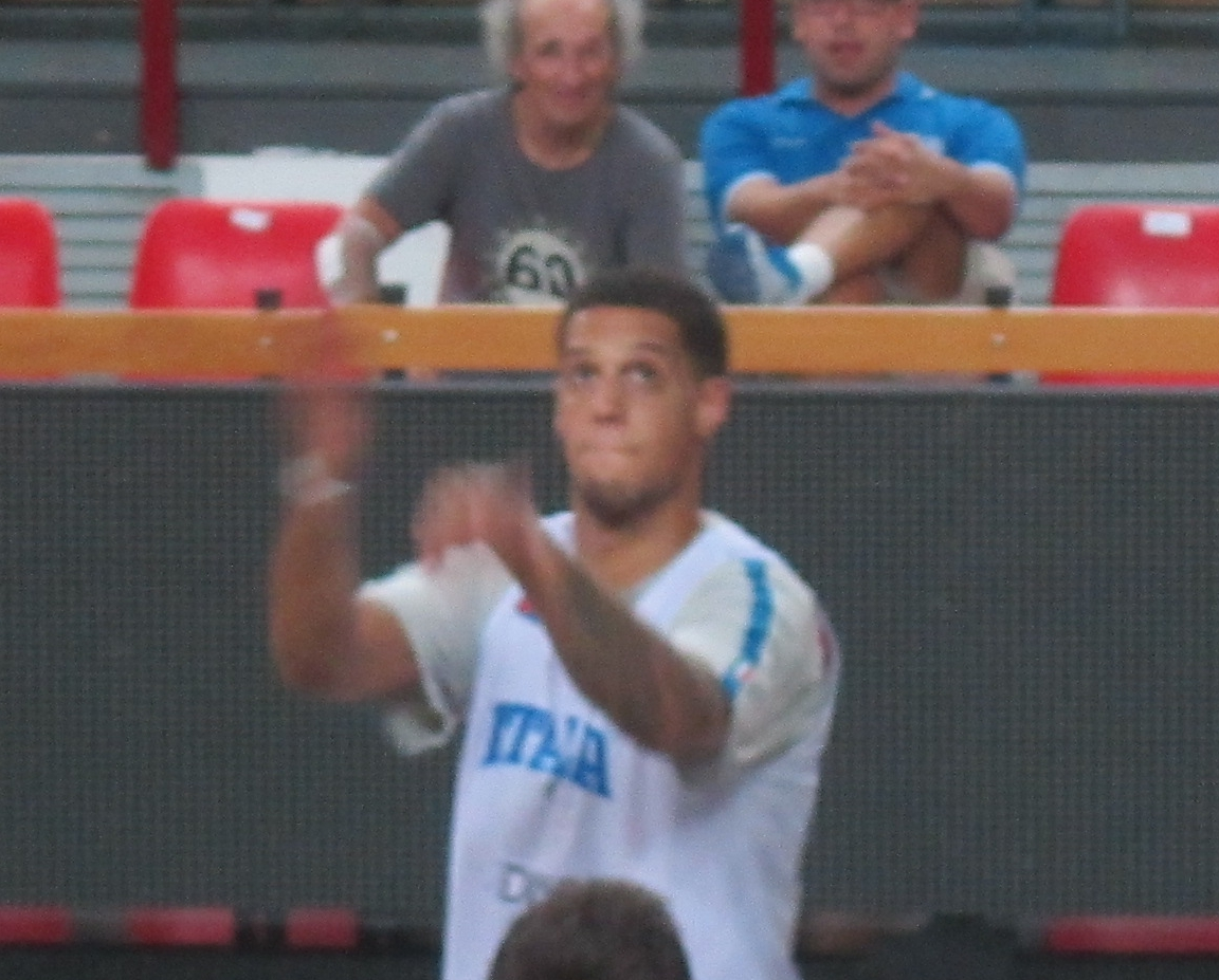 Daniel Hackett (al centro) nell'agosto 2011 durante un allenamento in preparazione agli Europei. Dietro di lui, il comico Bruno Arena dei Fichi d'India.